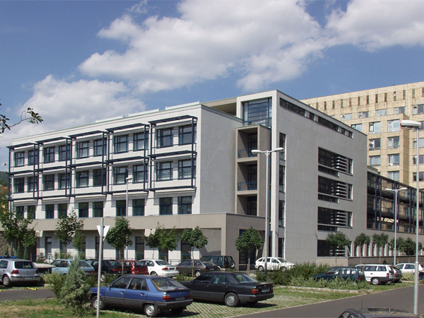 Szívgyógyászati Kilinika. Pécs, Ifjúság út 13. 1999